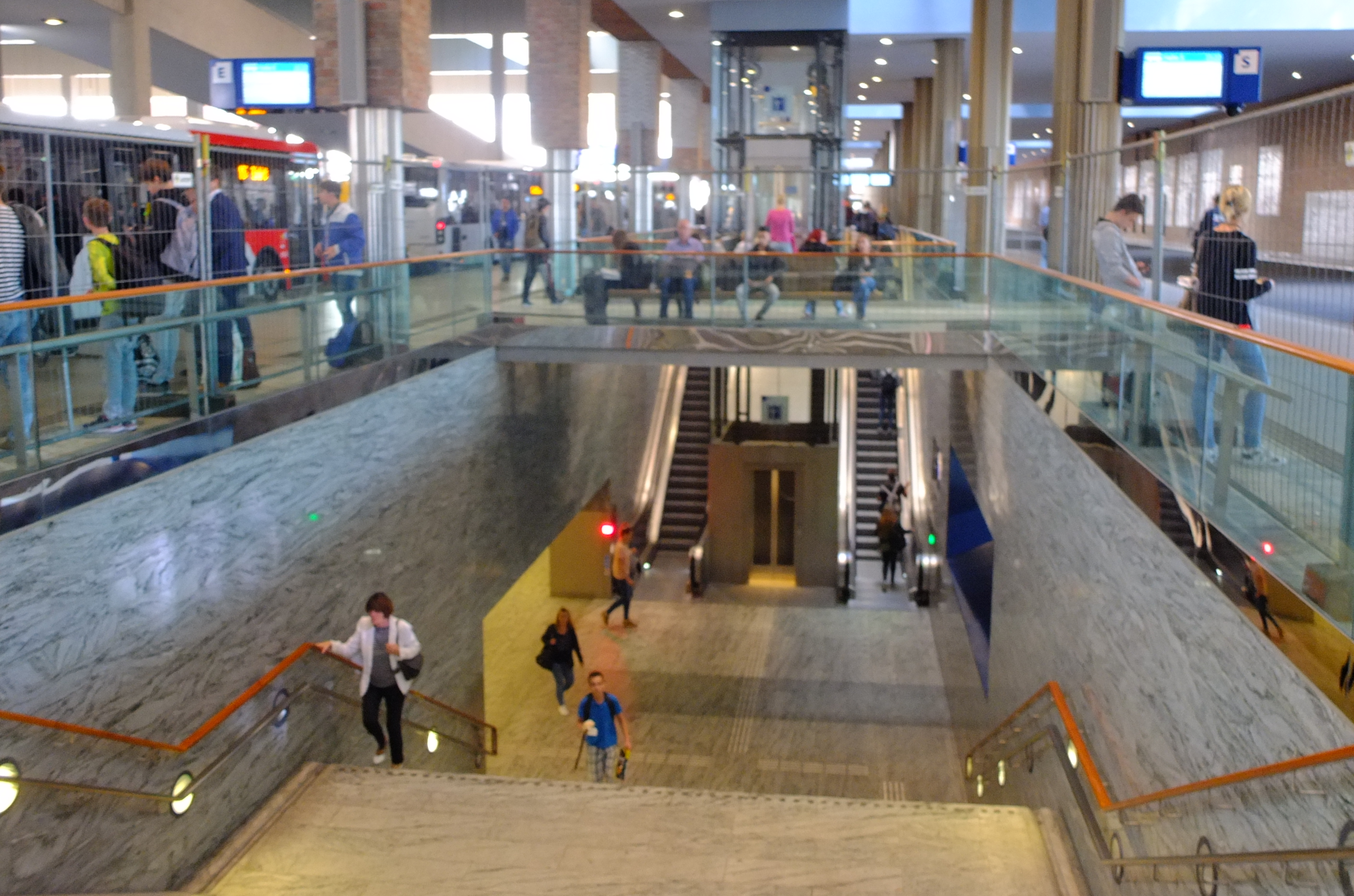 Bustation Nieuwe Station Breda